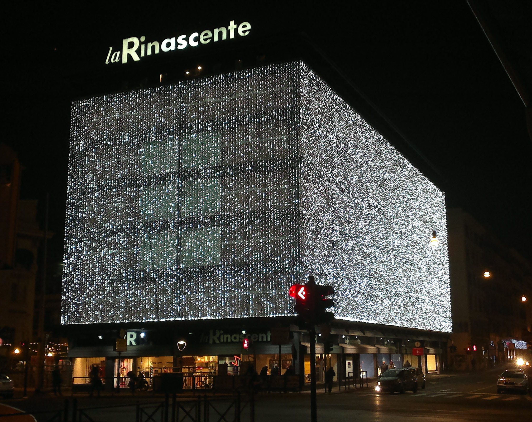 La Rinascente di Via Fiume This is a photo of a monument which is part of cultural heritage of Italy.